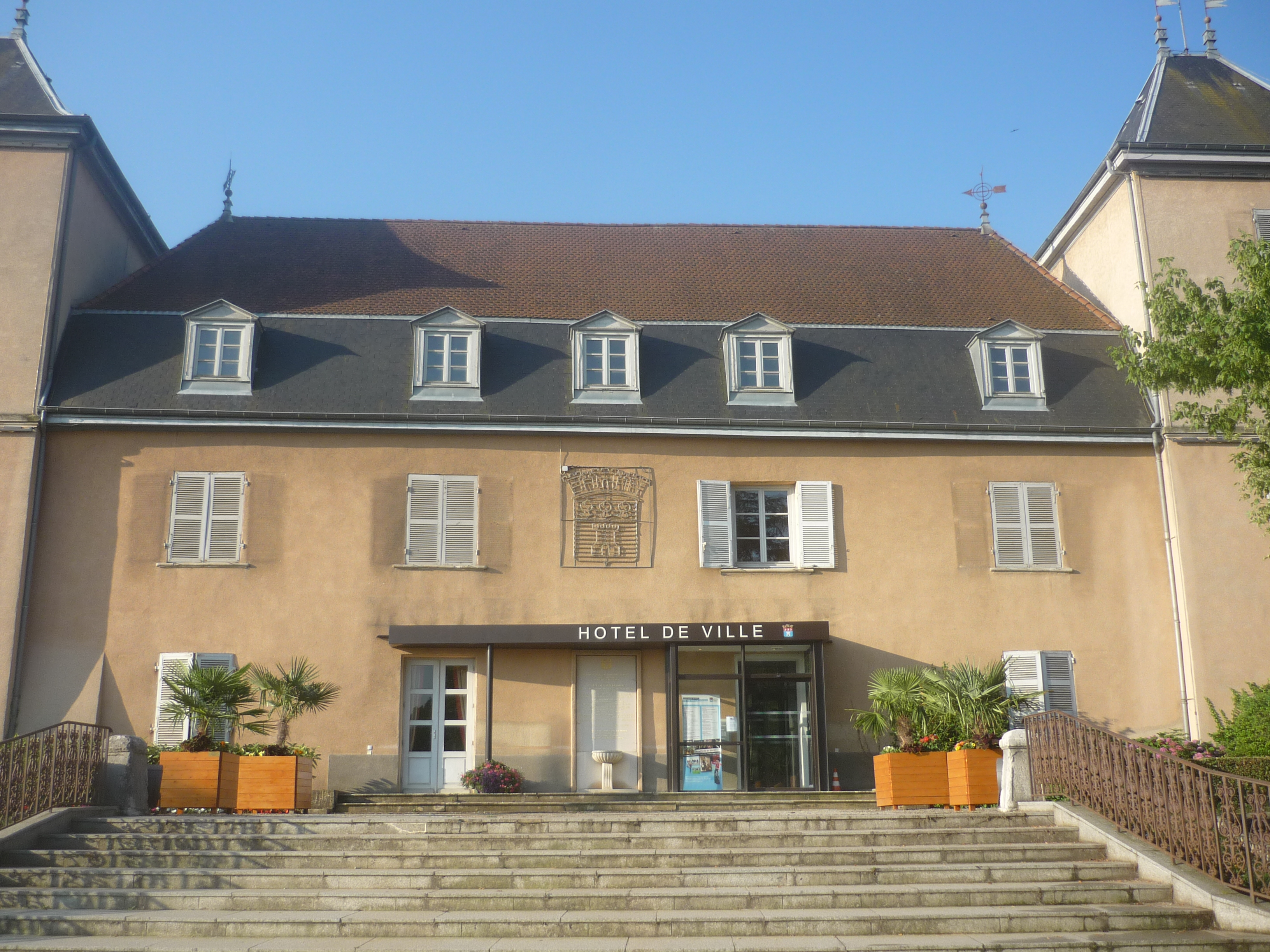 Hôtel de ville de Saint-Bonnet-de-Mure, dans le département du Rhône